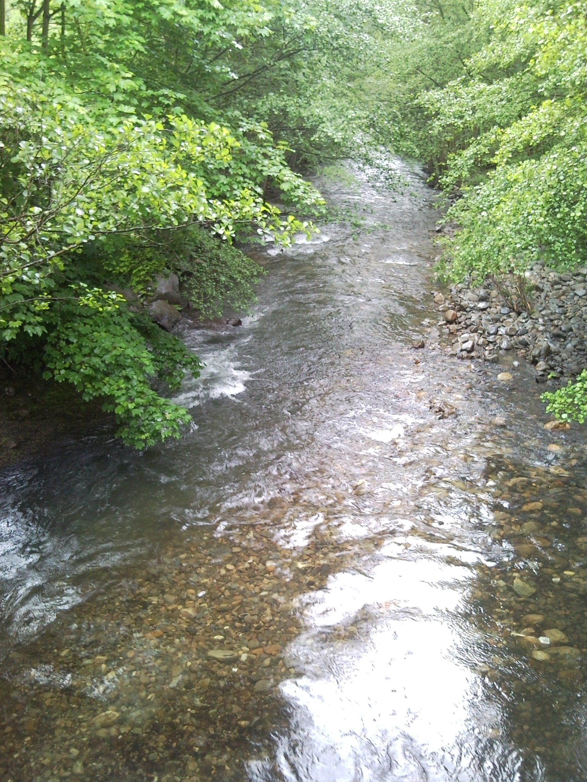 Río Narcea en el concejo de Cangas del Narcea, a la altura de Cibuyo.